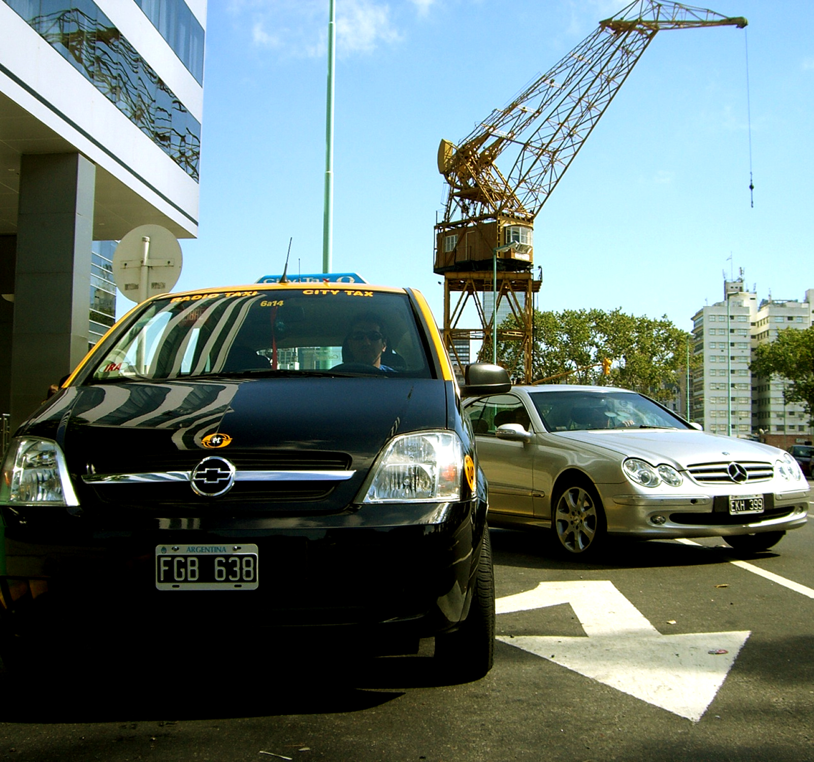 Taxi en Puerto Madero, Buenos Aires.